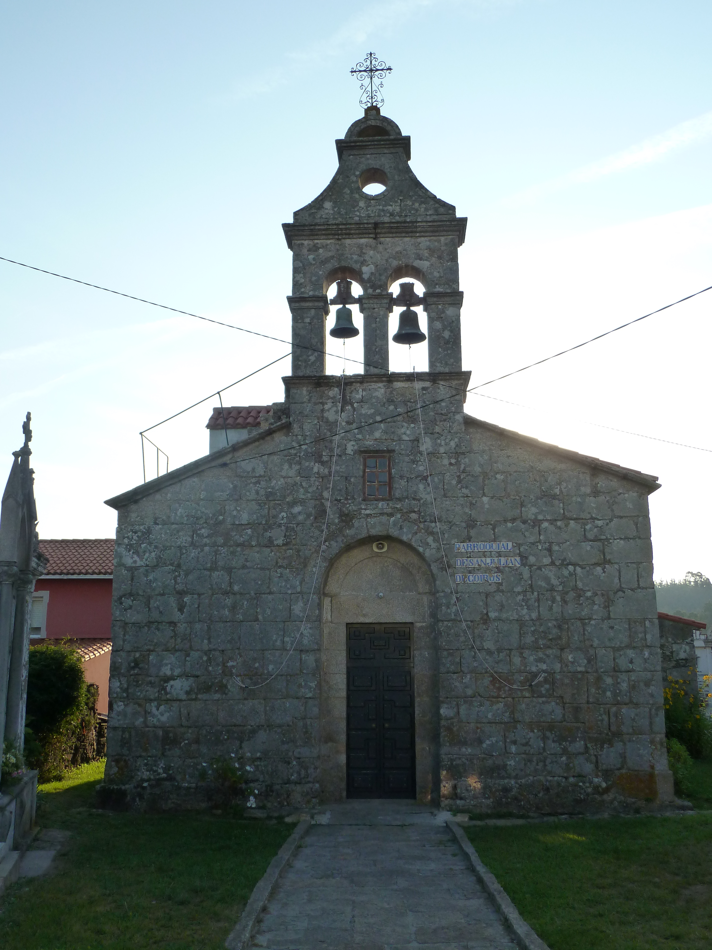 Igrexa Parroquial de San Xulián de Coirós.